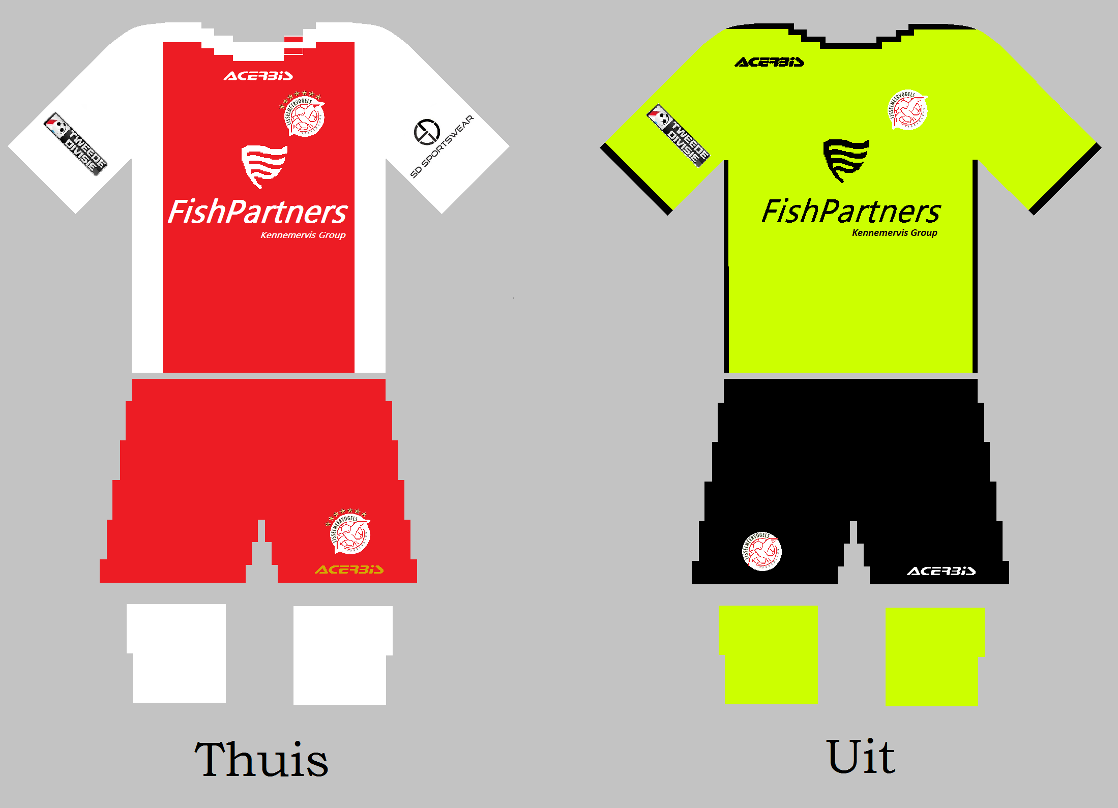 Shirt IJsselmeervogels 2019/20